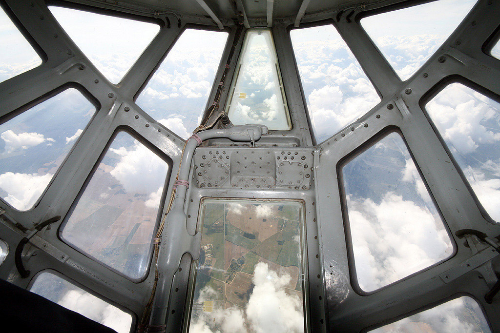 Glass nose